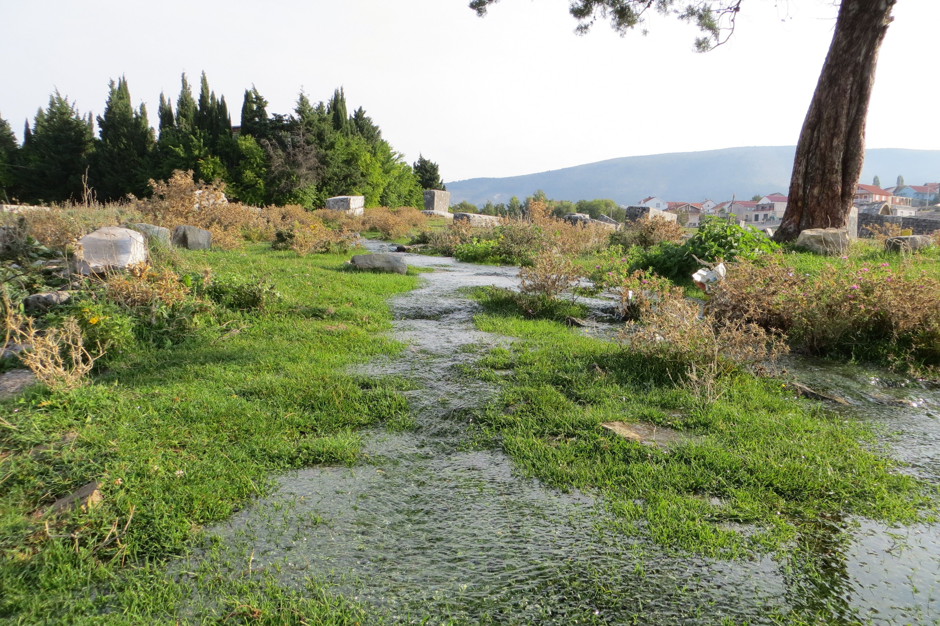 Bileća